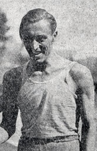 Bernard Santona en août 1947.